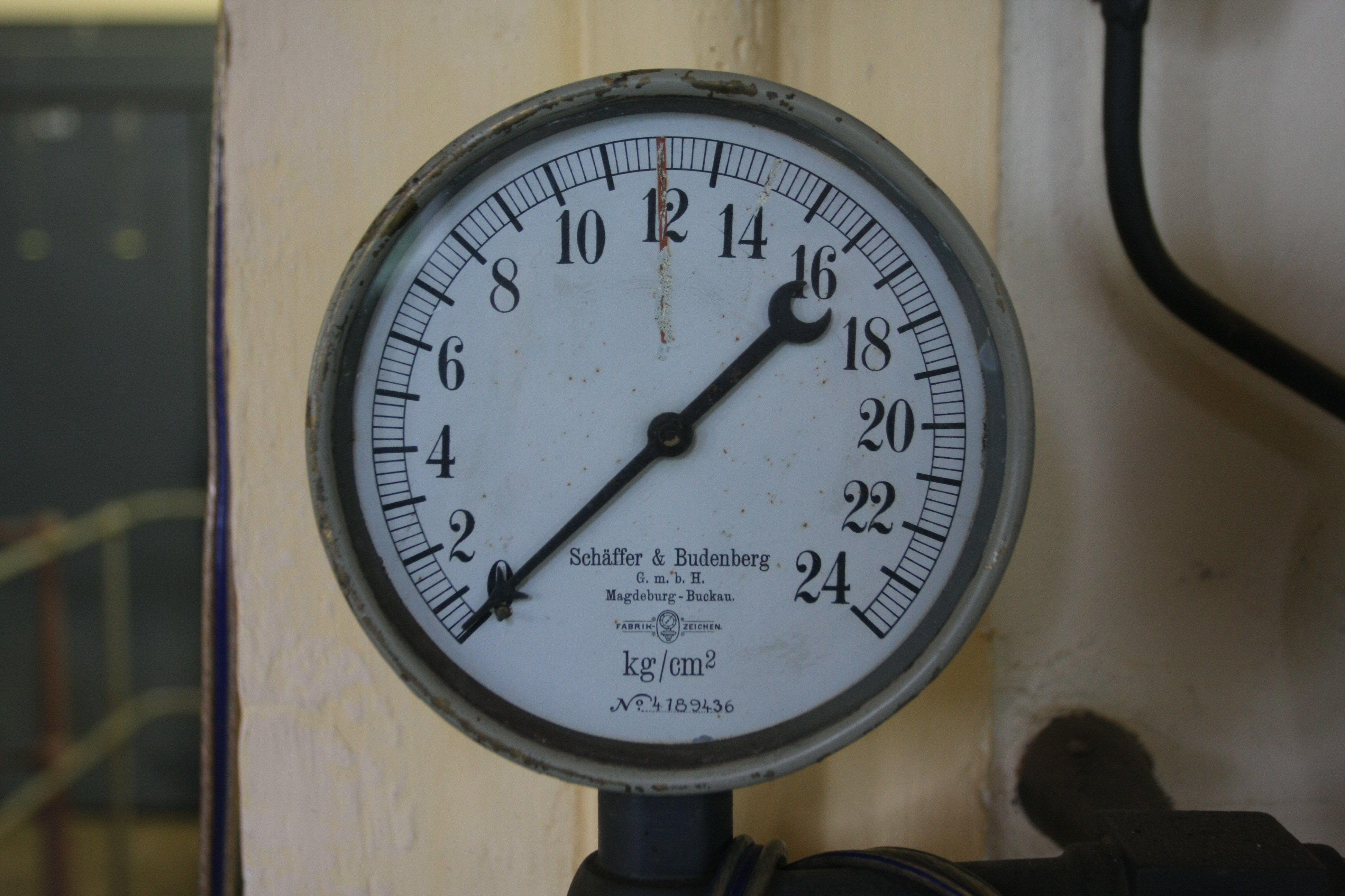 Druckmessgerät der Firma Schaeffer & Budenberg, älteste Brikettfabrik Europas.